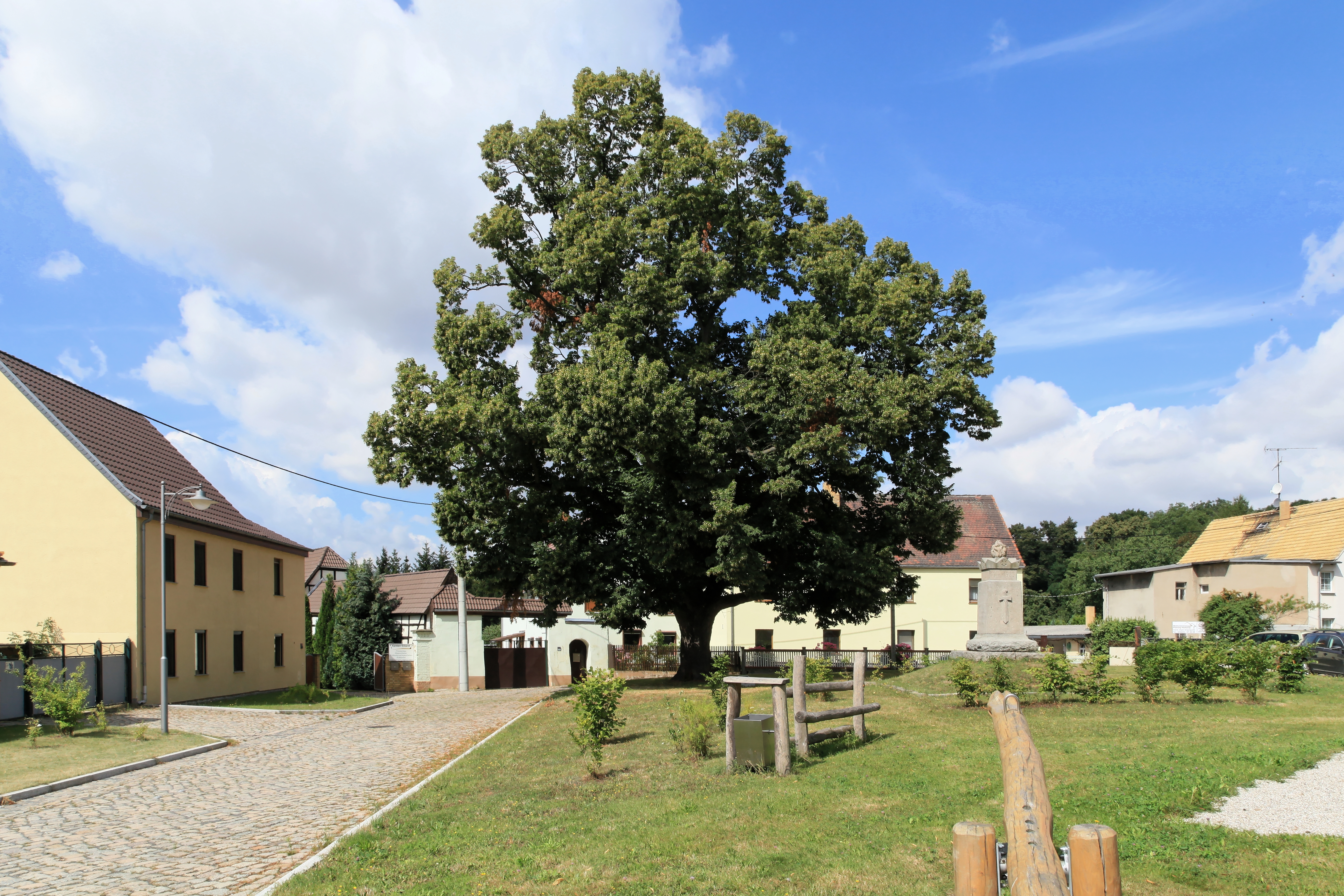 Moltke-Linde auf dem Lindenplatz in Weltewitz, Jesewitz